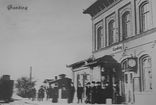 Bf Garding an der Eiderstedter Bahn um 1900